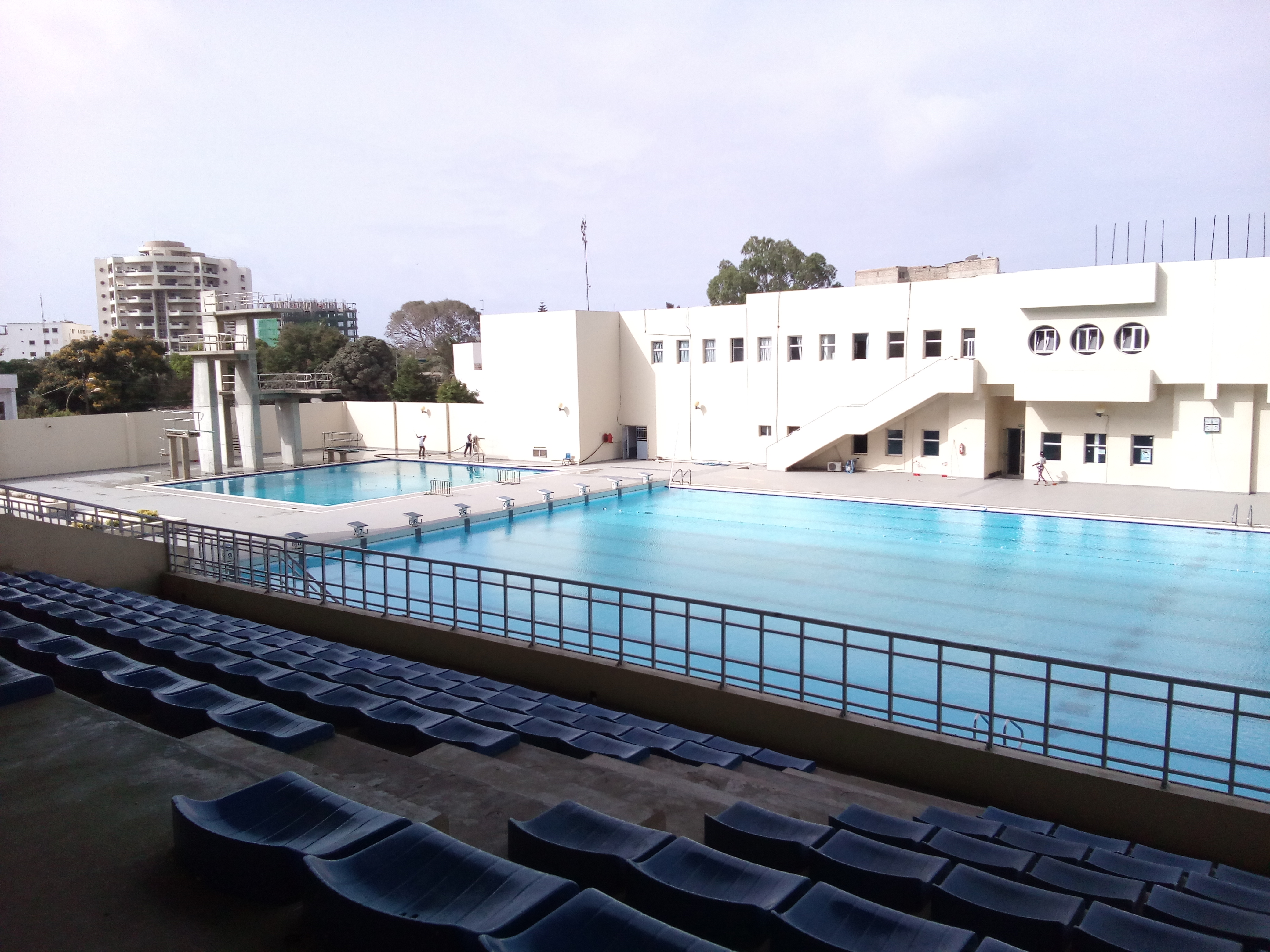 La Piscine Olympique Nationale, inaugurée le 17 mai 2002, fait partie d'un complexe sportif multisports comprenant aussi des salles de séminaire et un centre d'hébergement.